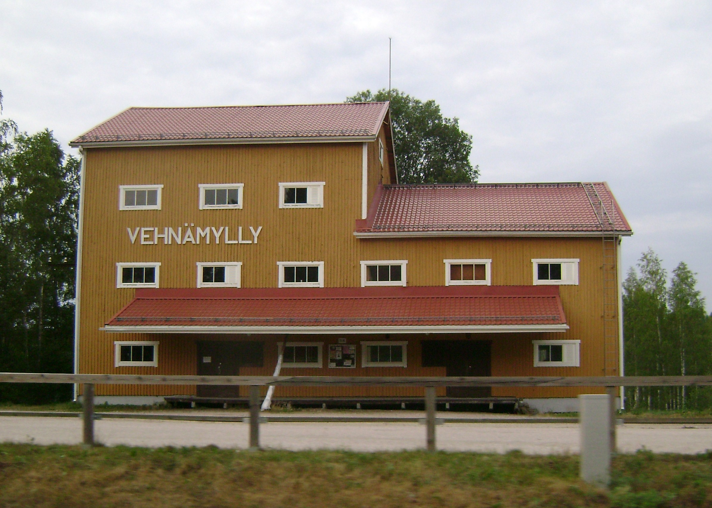 Vehnämylly Iitin Vuolenkoskella.